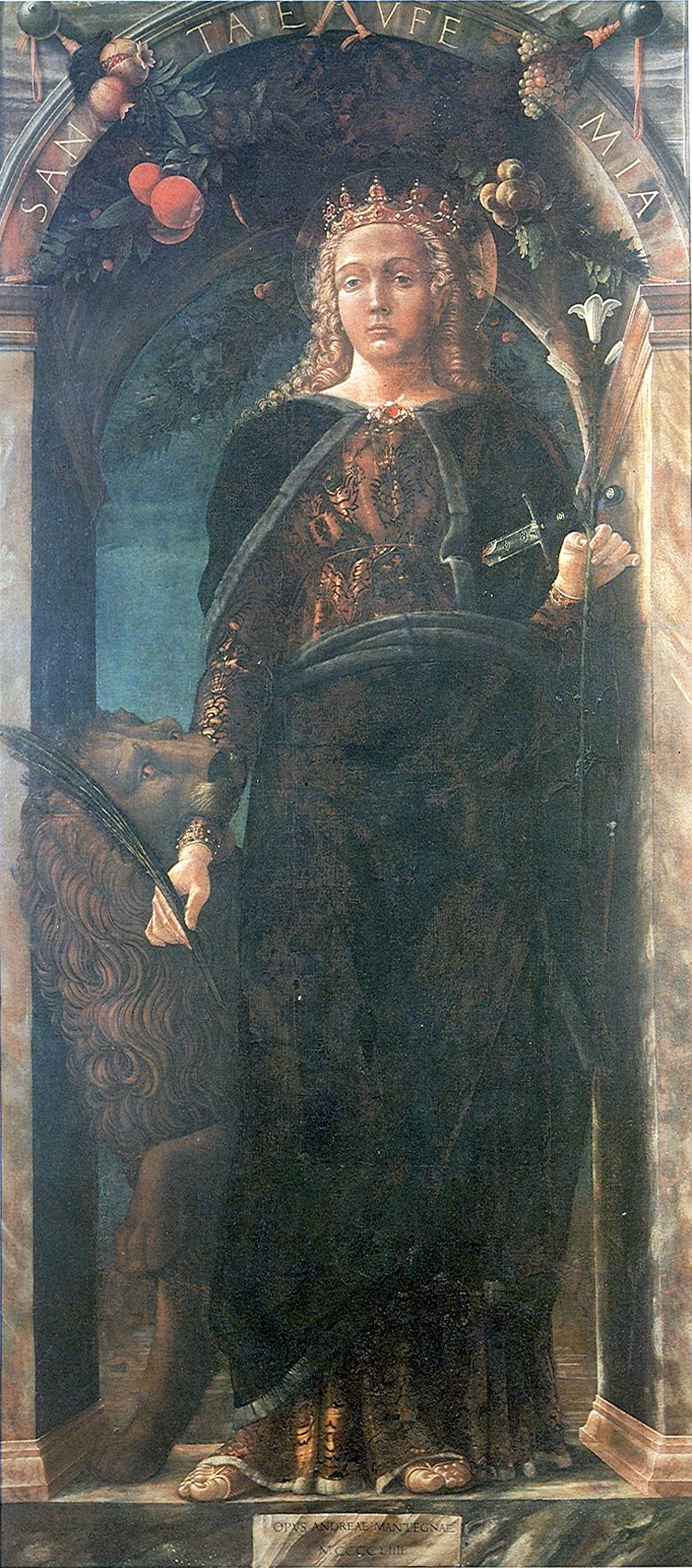 Sant'EufemiaSaint Euphemialabel QS:Lit,"Sant'Eufemia"label QS:Len,"Saint Euphemia"